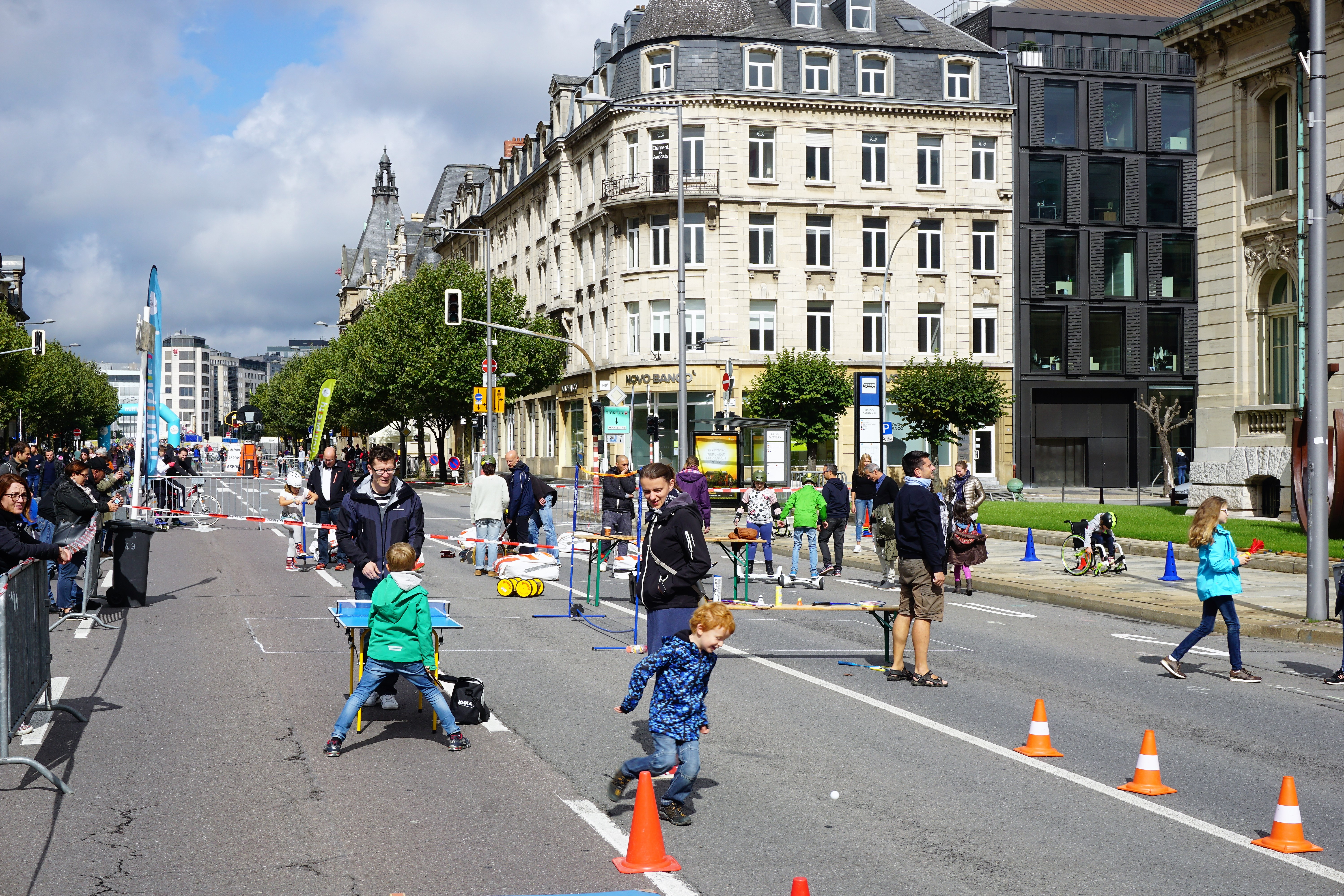 "La ville est belle" dans le cadre de la Semaine européenne de la mobilité à Luxembourg. - Ateliers sports et loisirs pour tous dans l’avenue de la Liberté